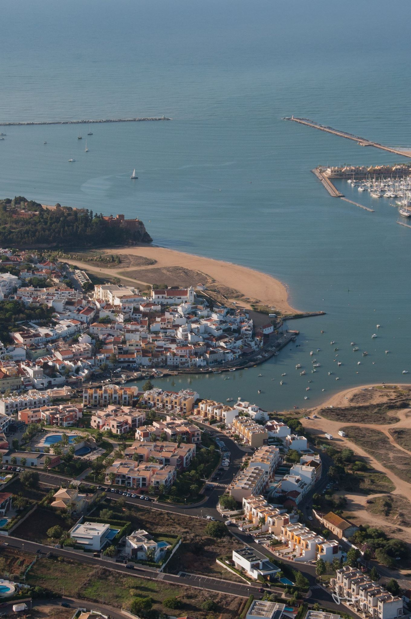 Ferragudo aan de rivier Arade uitgang naar atlantische oceaan